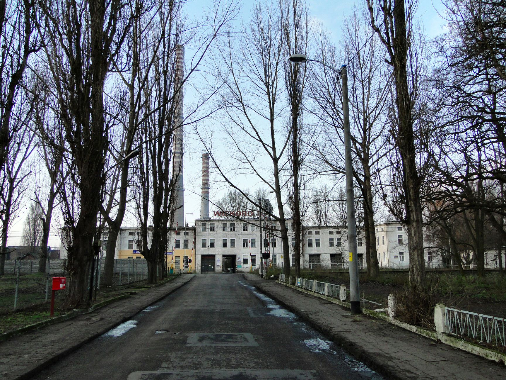 Szczecin Żydowce dawne Zakłady Wiskord.jpg